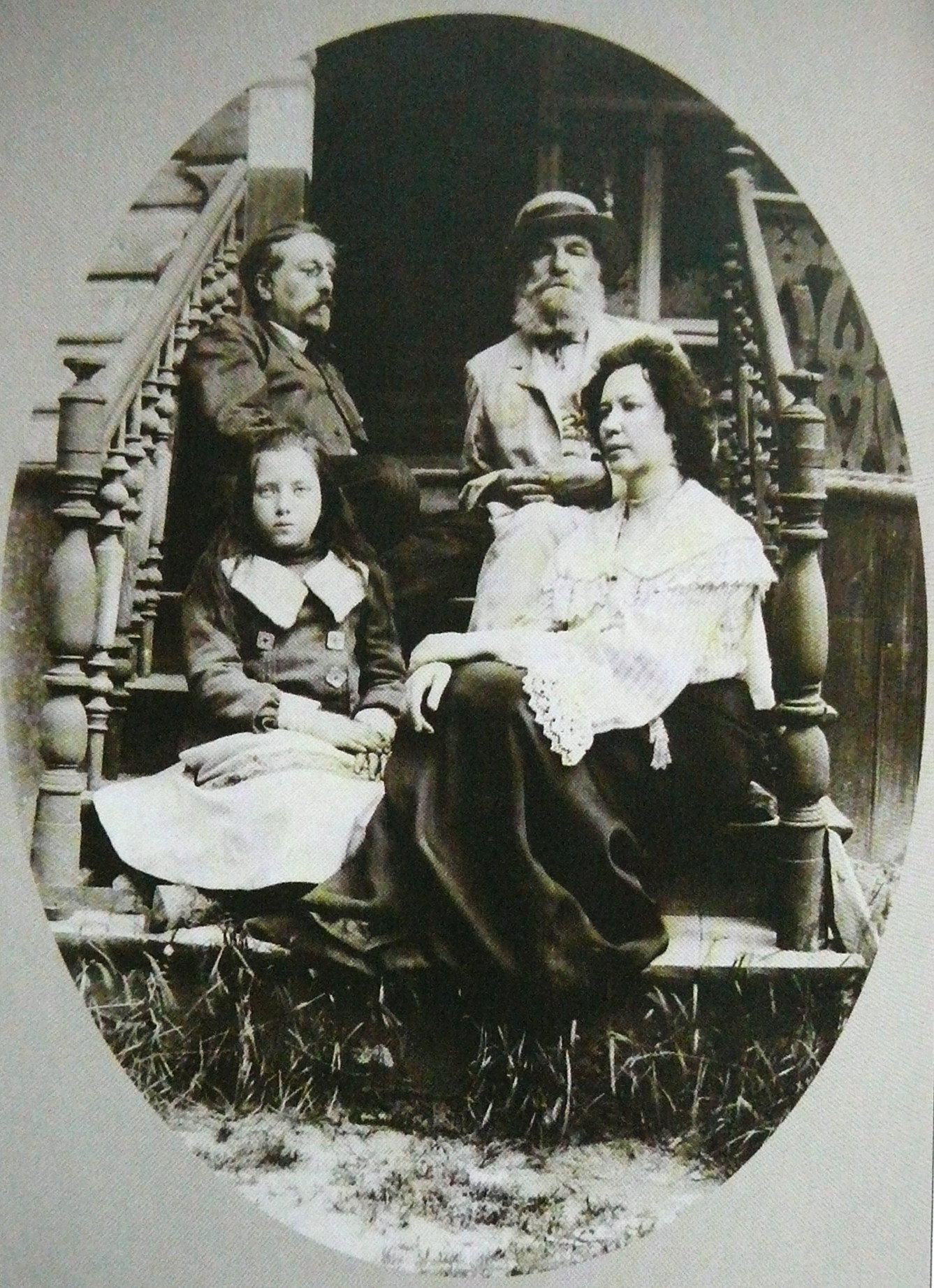 Николай Алексеевич Ильяшенко (редактор газеты "Казанский Телеграф"), Егор (Георгий) Иванович Парамонов (первый директор Казанского учительского института), Александра Георгиевна Ильяшенко (издательница газеты "Казанский Телеграф") и Нина Николаевна Ильяшенко (дочь Н.А. и А.Г. Ильяшенко)